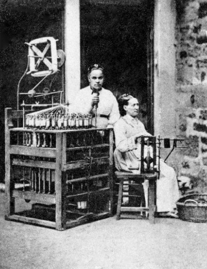 Métier à lacets, Saint-Chamond, vers 1905.